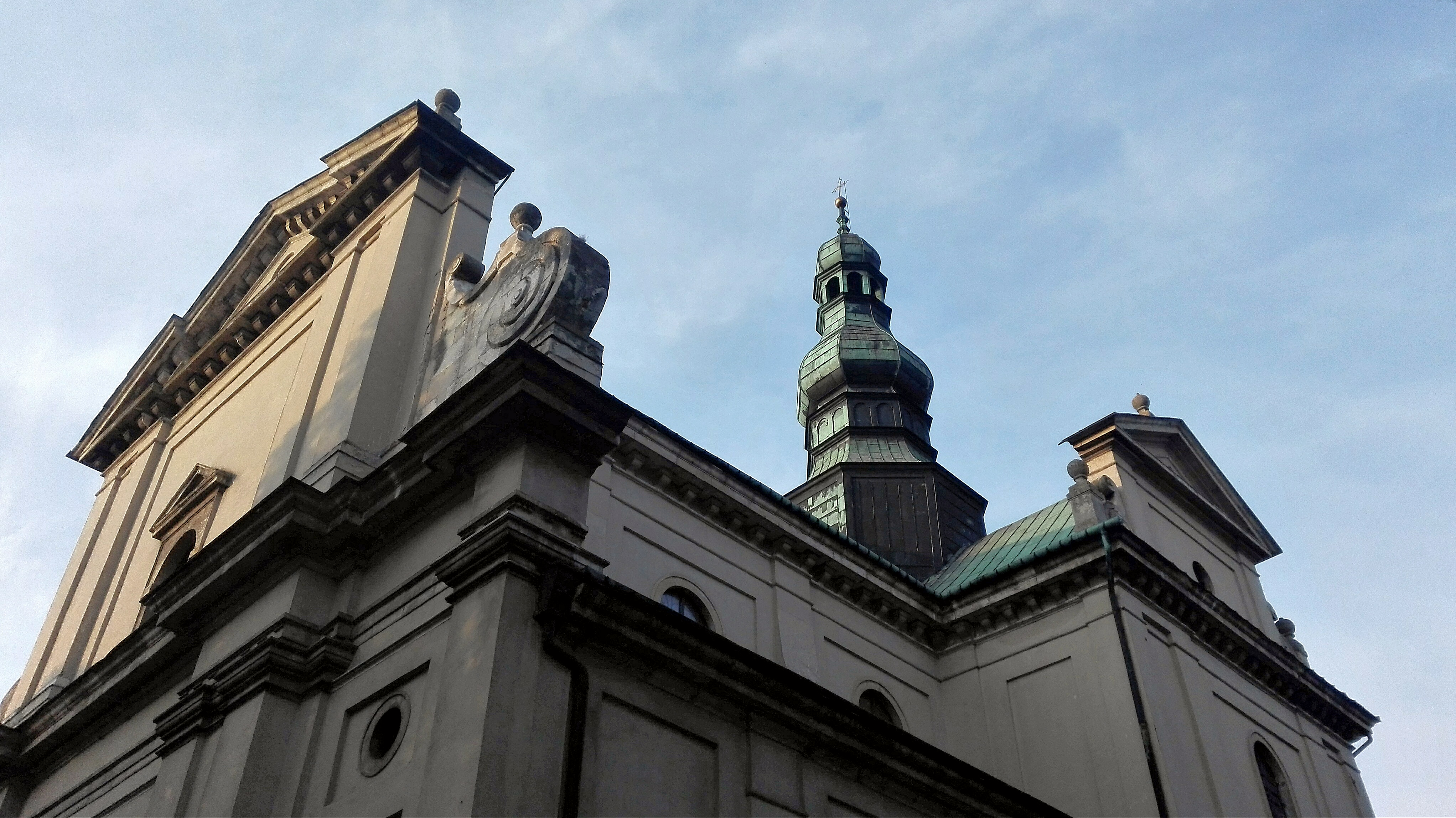 Widoczna główna fasada wraz wieżą kościelną.